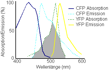 Bron: [1] Beschrijving daar: Absorptions- und Emissionsspektren von YFP und CFP. Für einen FRET ist die Überlappung der Emissions- und Absorptionsspektren der Fluorophore eine Voraussetzung. Erstellt am 15.09.2005 von Sven Jähnichen. c/ Dieses Bild wurde von seinem Urheber zur uneingeschränkten Nutzung freigegeben oder erreicht nicht die nötige Schöpfungshöhe, um geschützt zu sein. Das Bild ist damit gemeinfrei („public domain“). Uneingeschränkte Nutzung bedeutet, dass das Bild beliebig, auch ohne Namensnennung, verbreitet, kommerziell genutzt und verändert werden darf, in dem Umfang, der in der jeweiligen nationalen Rechtsordnung möglich ist. This work has been released into the public domain by its author, Sven Jähnichen. This applies worldwide. In some countries this may not be legally possible; if so: Sven Jähnichen grants anyone the right to use this work for any purpose, without any conditions, unless such conditions are required by law.